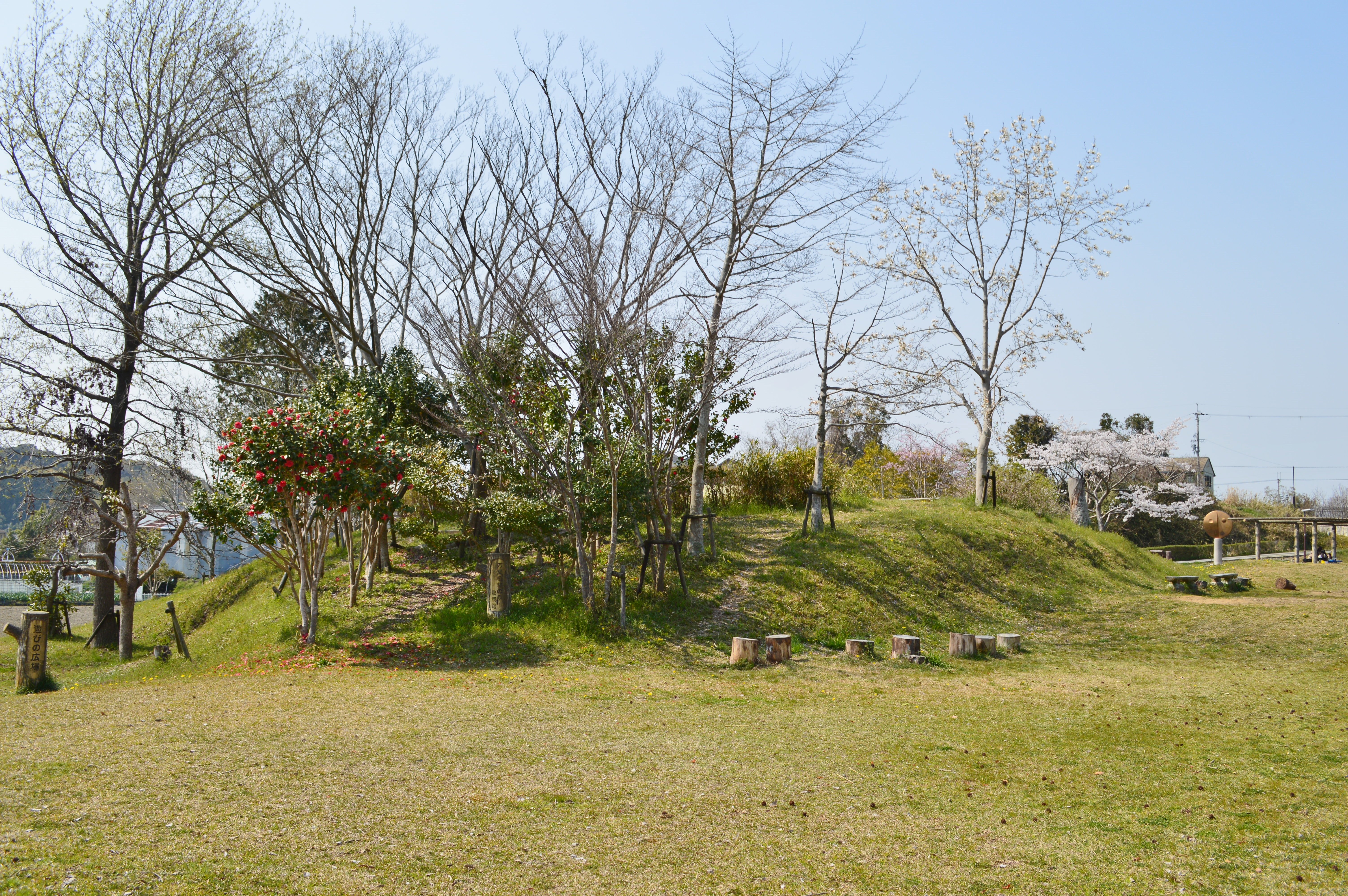 葉室石塚古墳 墳丘全景 Nikon D3200